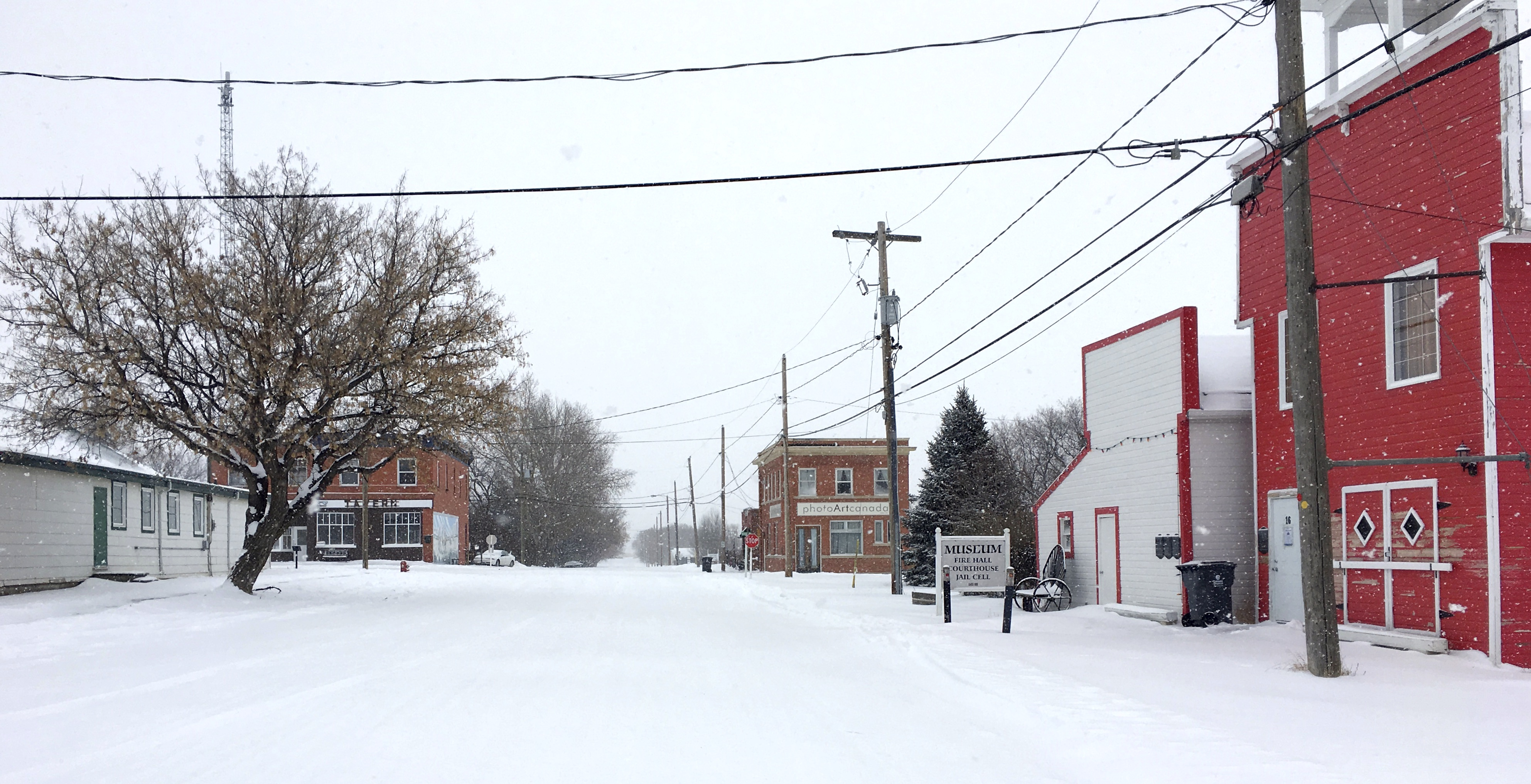 Mortlach, Saskatchewan.